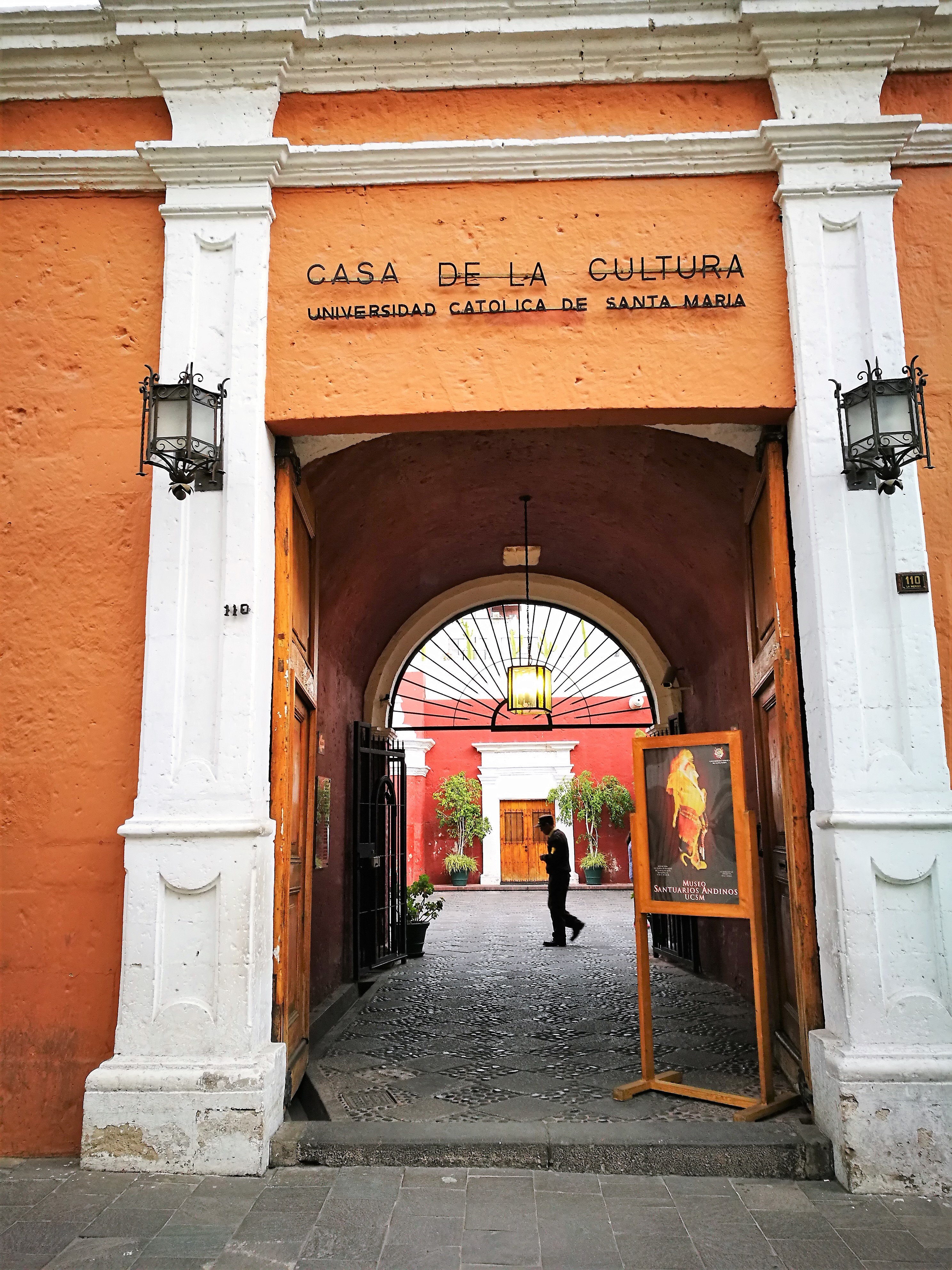 Casa de la Cultura de la Universidad Católica de Santa María